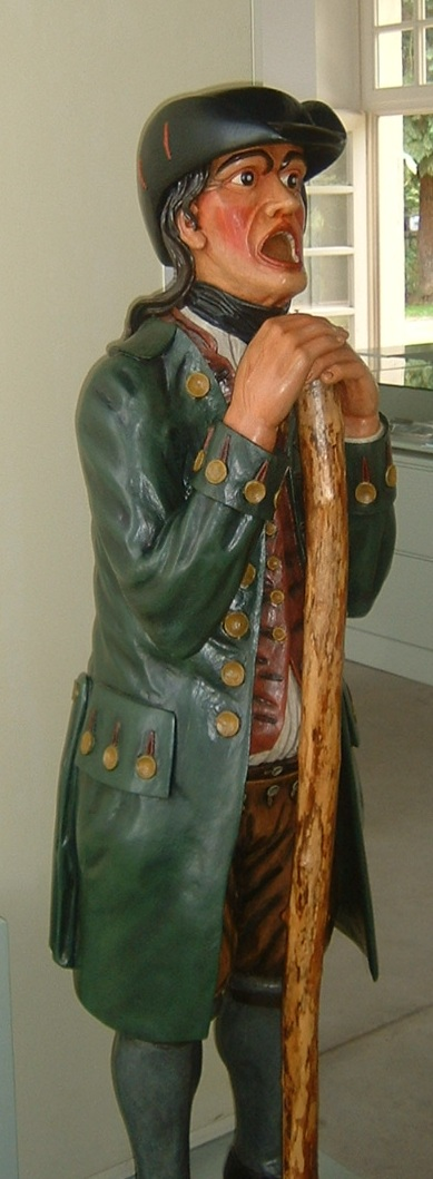 Spielfigur Maulaffe im Park Schönbusch Aschaffenburg. Bälle wurden zur Belustigung seitens des Publikums in den Mund geworfen. Sie kamen am Boden wieder heraus.